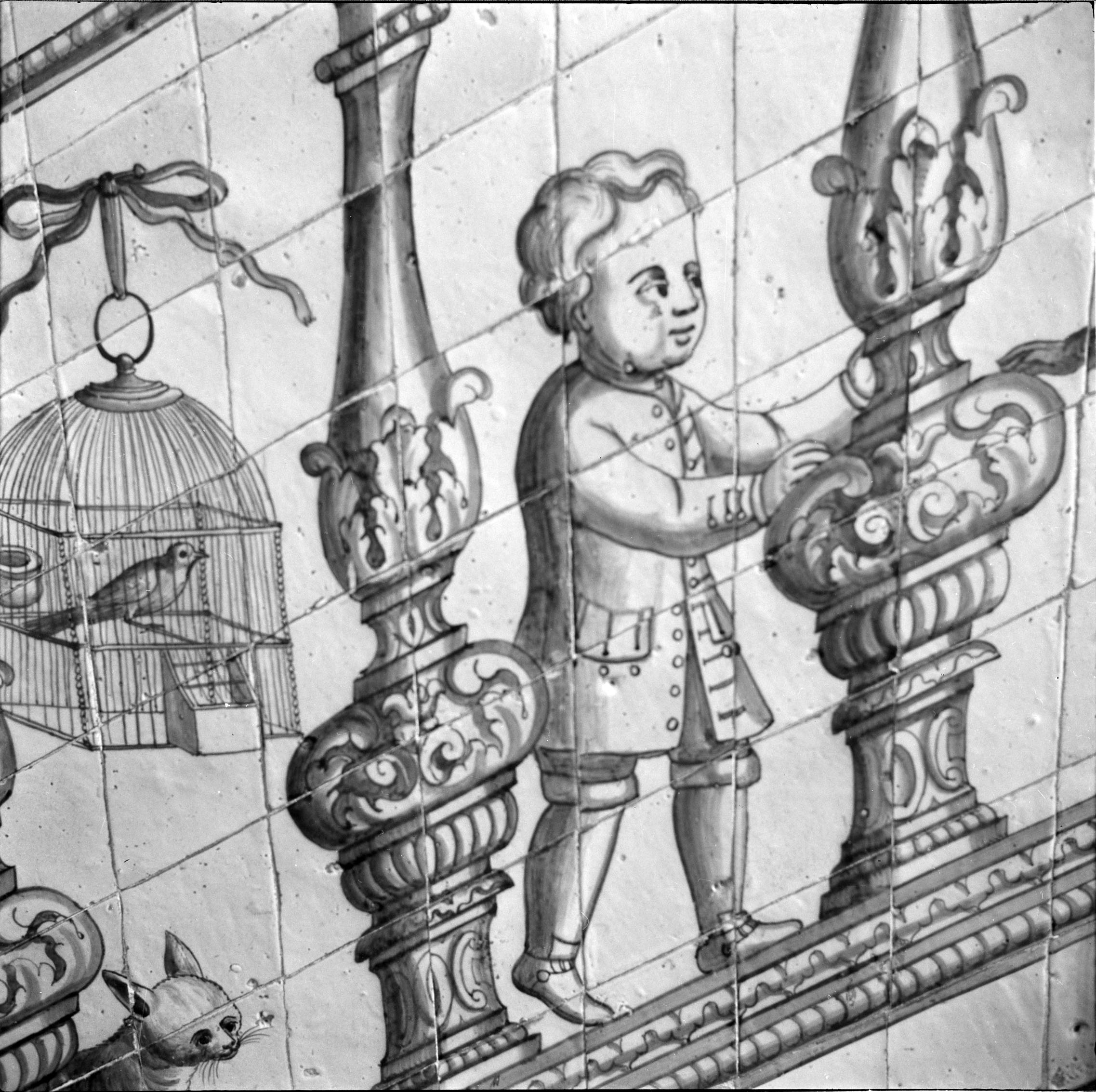 Escada principal. Azulejos do século 18. Autor: João Miguel dos Santos Simões (1907-1972). Data de produção da fotografia original: 1960-1970. [CFT009.1157n.ic]